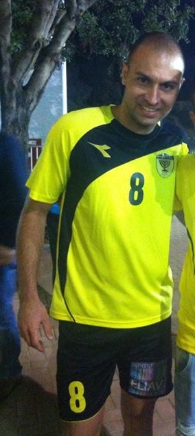 אבירם ברוכיאן